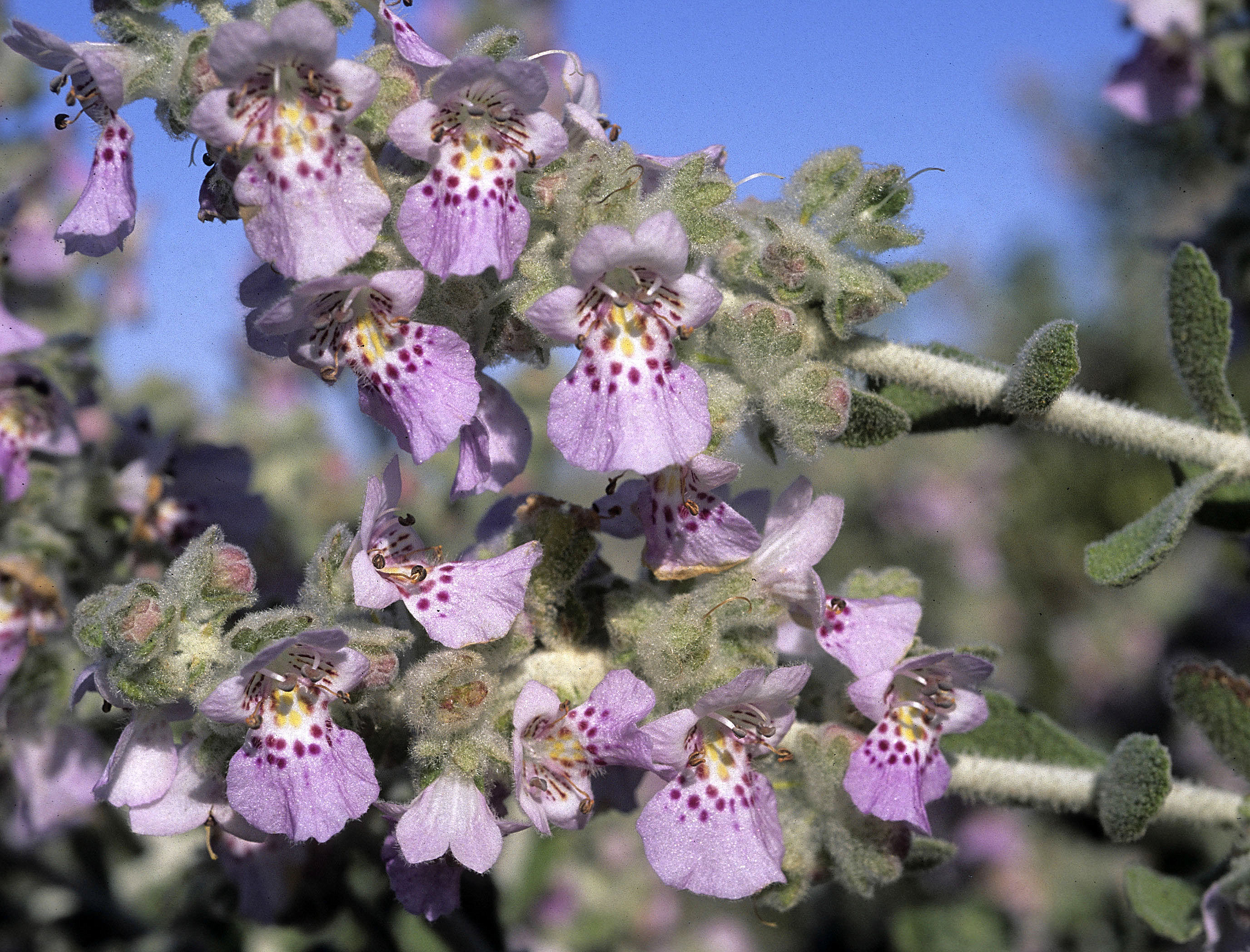 Quoya atriplicina en Shark Bay, al Este de Danham, François Peron National Park, Western Australia.